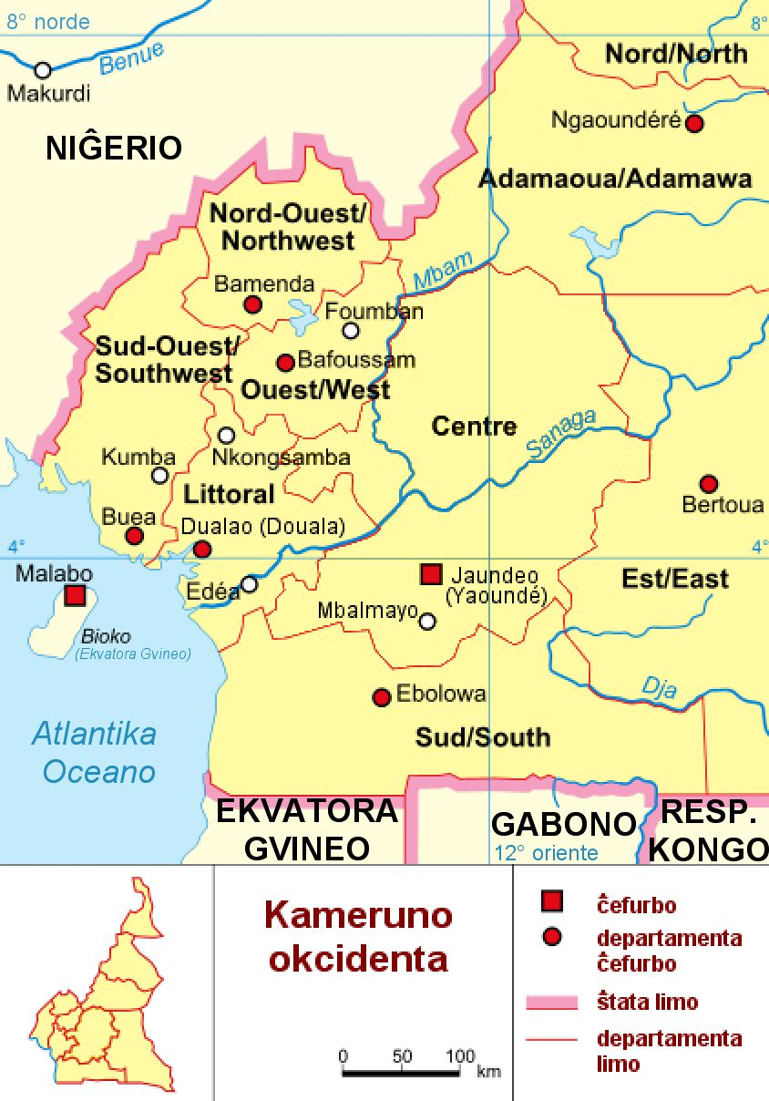 Mapo pri la okcidenta parto de la ŝtato Kameruno. Similstilaj mapoj aperas en diversaj variaĵoj en la germanlingva vikipedio, ekzemple jen pri la provinco Centre.